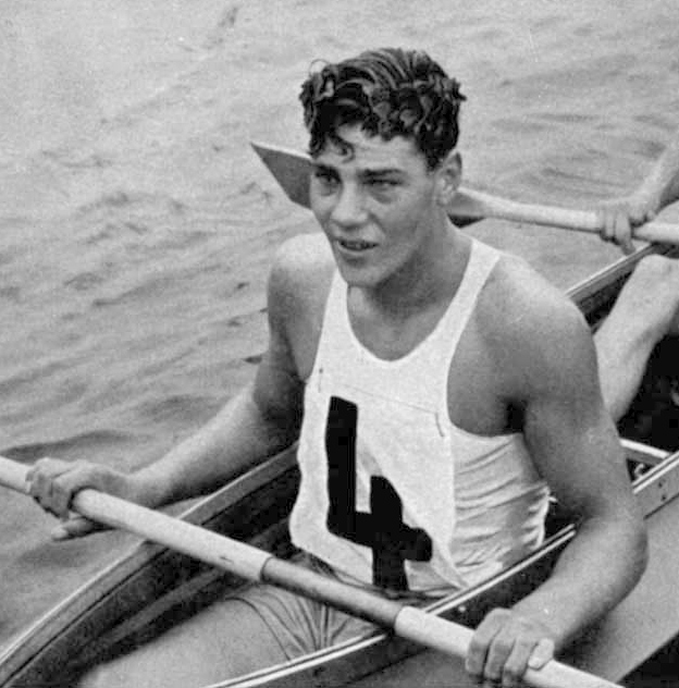 Erik Bladström, Berlin Olympics